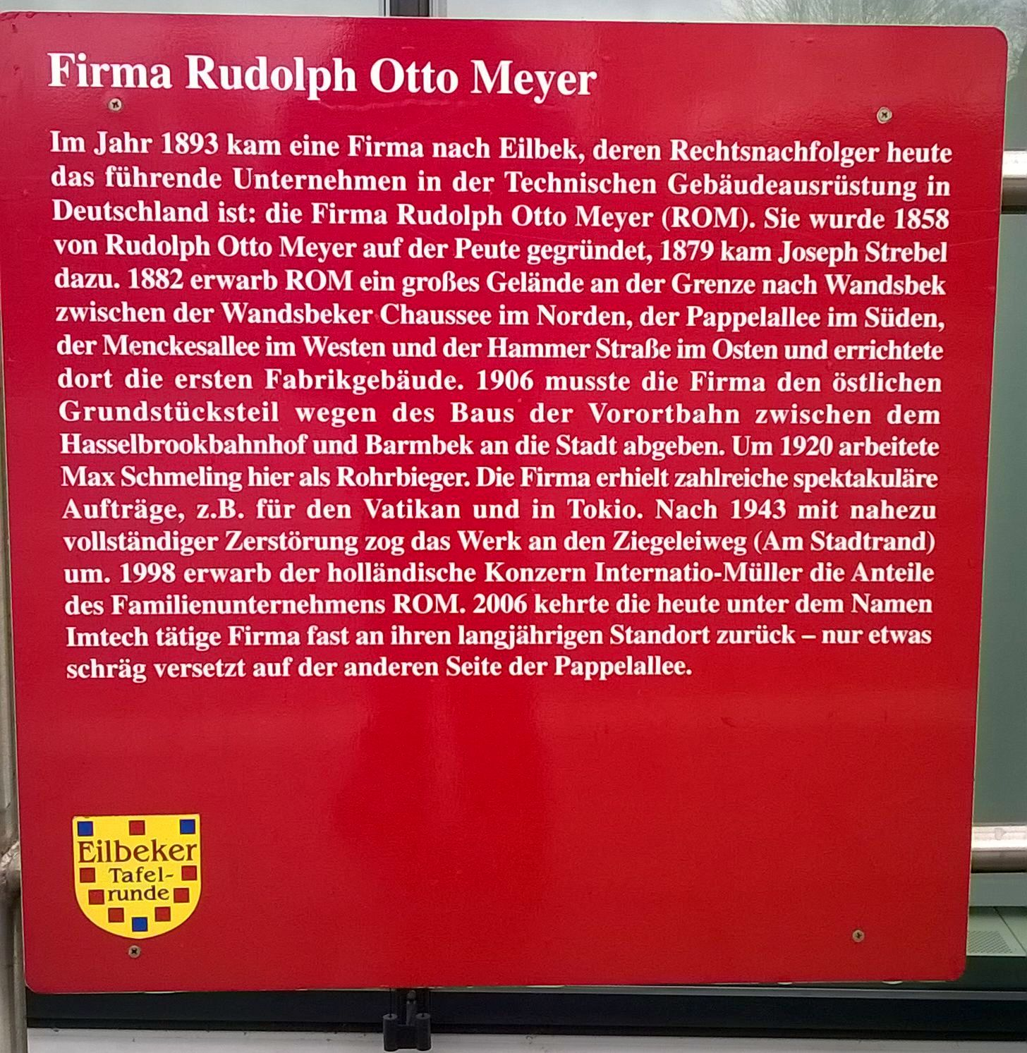 Gedenktafel der Eilbeker Tafelrunde mit Informationen zur Geschichte der Firma Rudolph Otto Meyer, heute "imtech", Pappelallee, unmittelbar neben der S-Bahn-Brücke